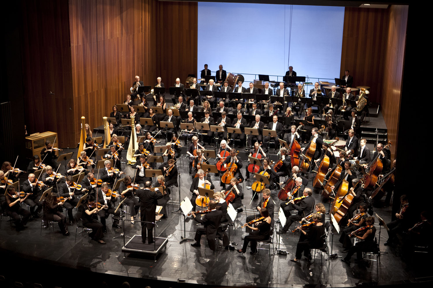 Sinfonieorchester Münster im Großen Haus des Theaters